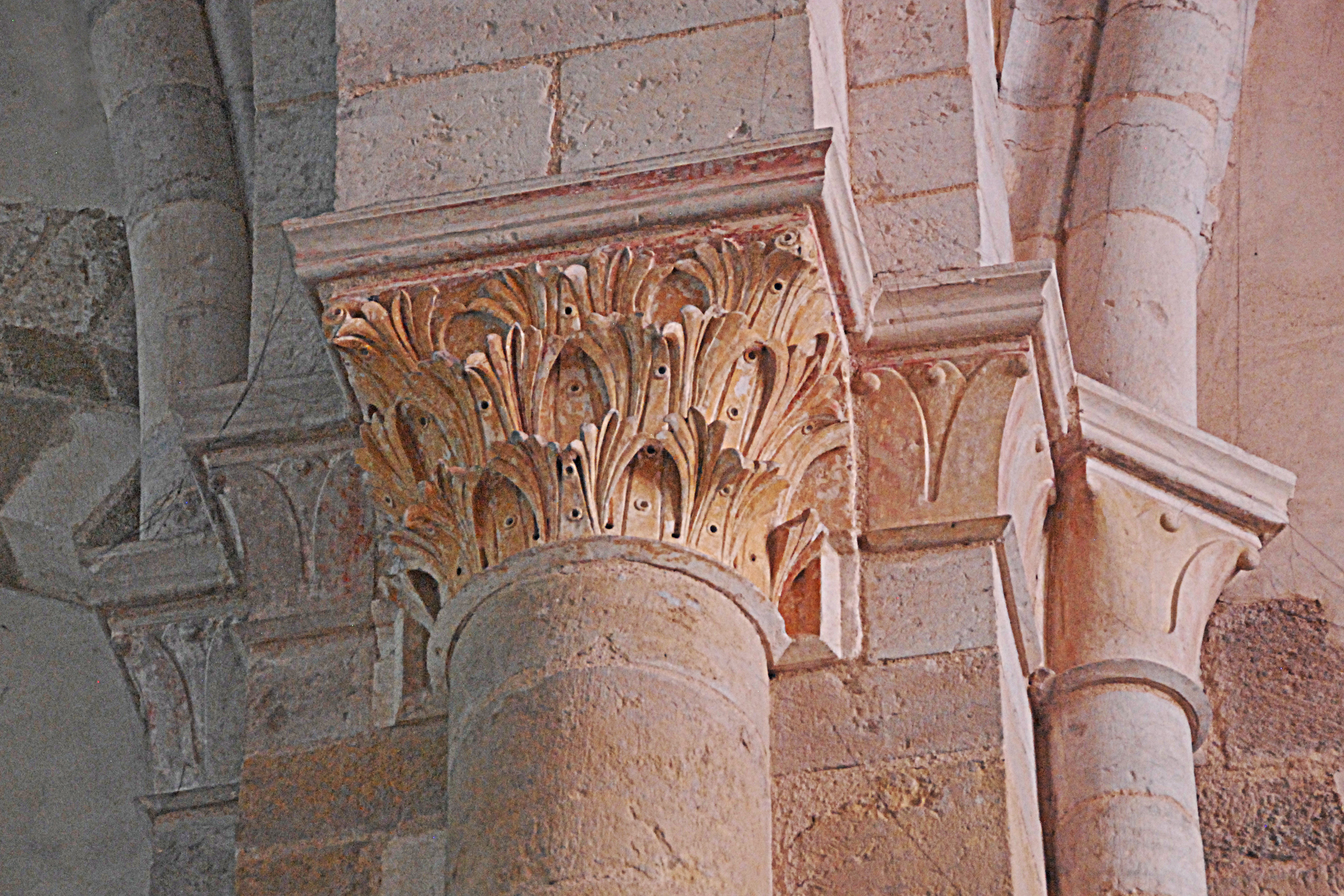 Neuvy_St.-Sépulcre, Basilika, Mittelschiff, Kapitellbündel